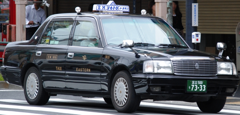 イースタンモータースのタクシー